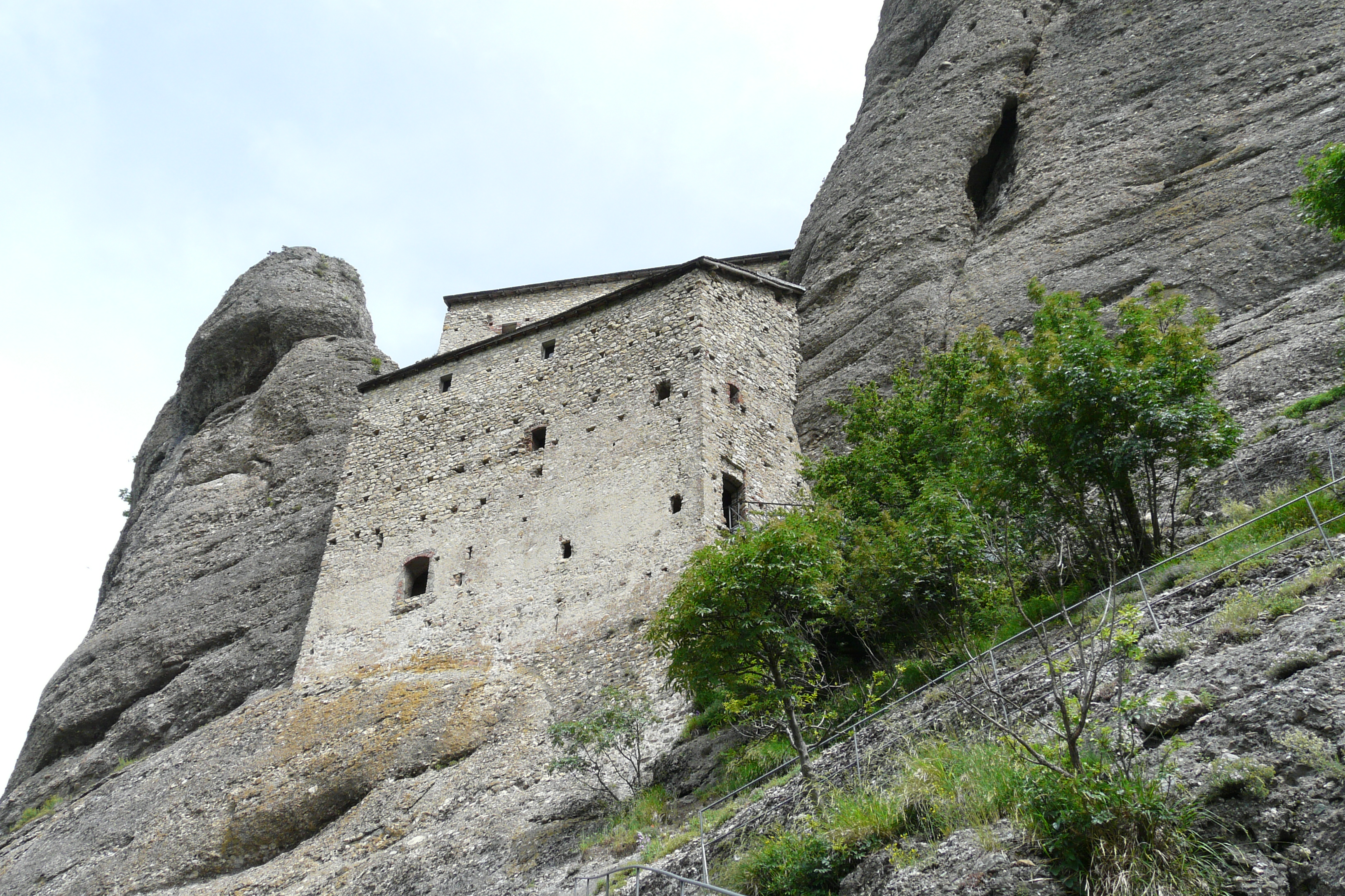 Serie di immagini interne ed esterne del Castello della Pietra di Vobbia, Liguria, Italia